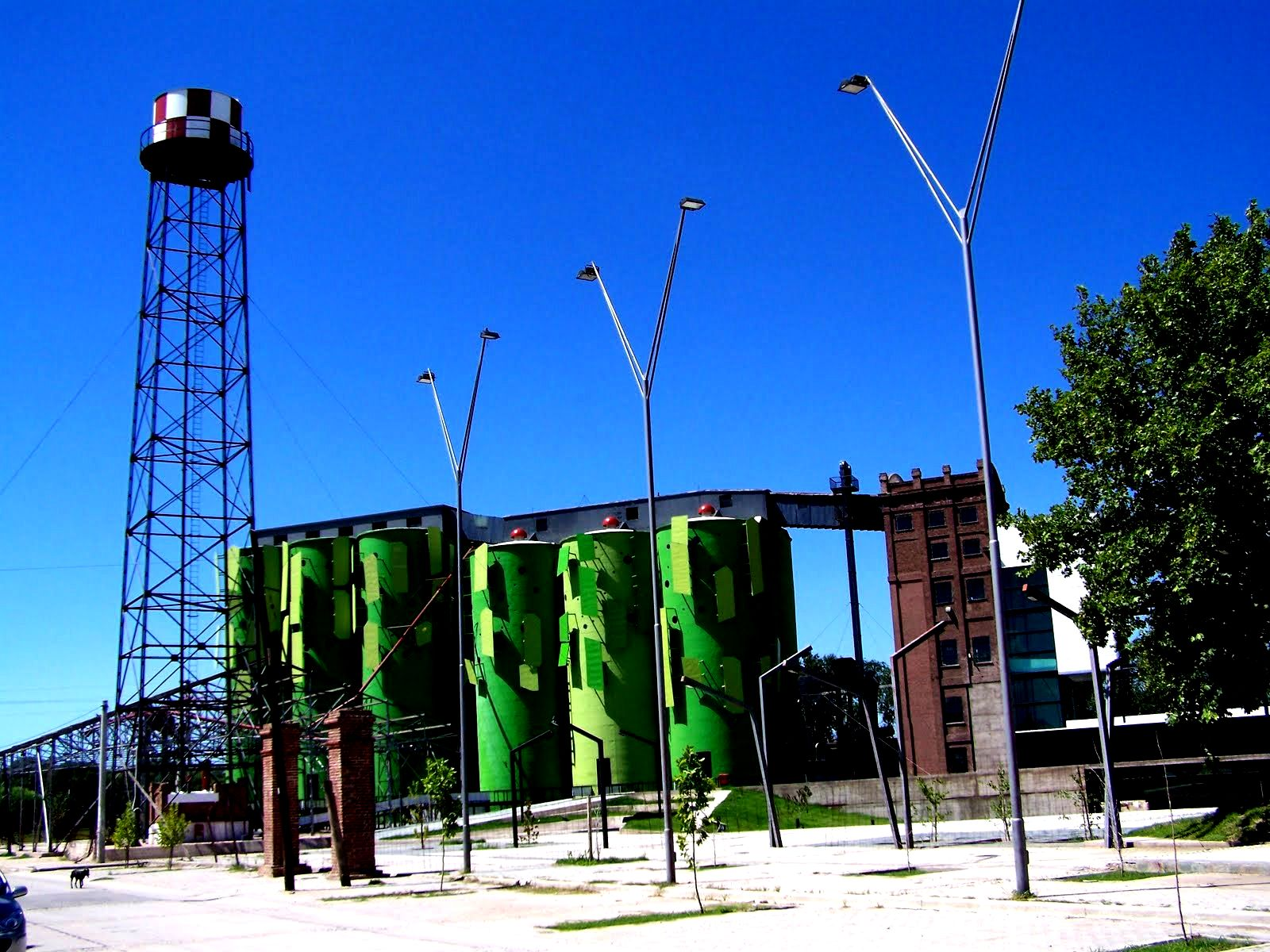 Complejo Cultural Molino Fenix